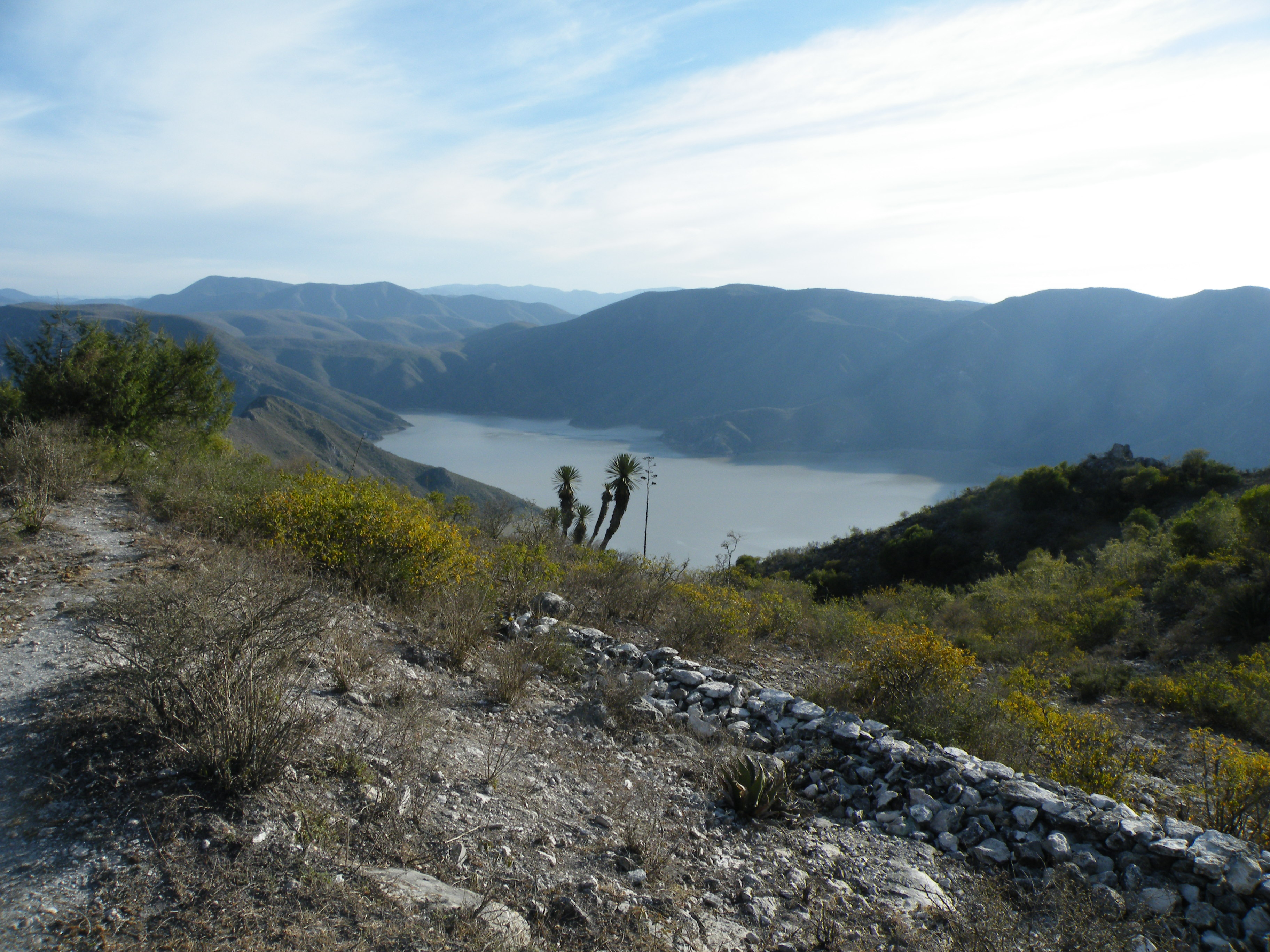 Gilo, Hidalgo